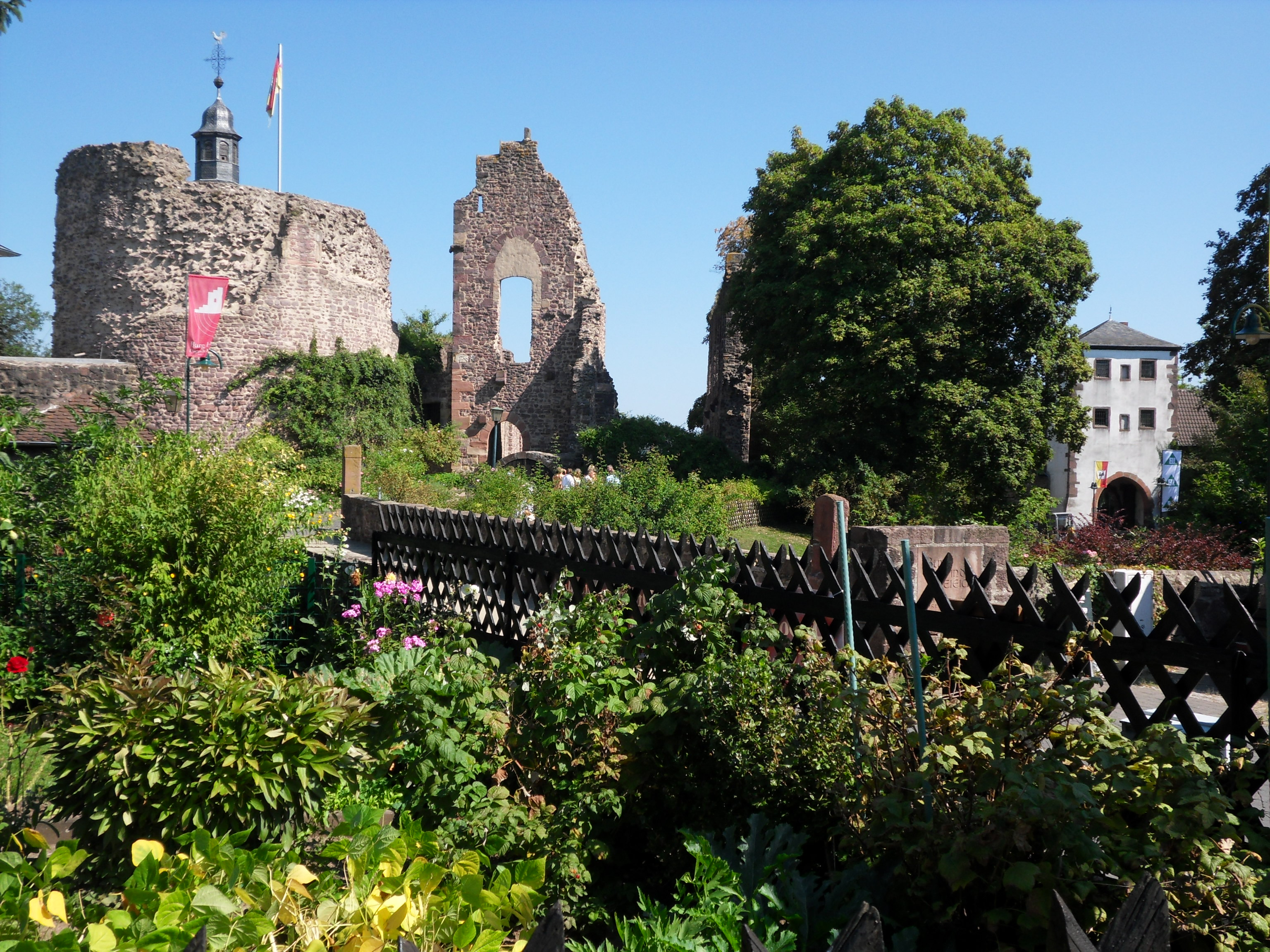 Denkmalgeschützte Gesamtanlage Burgruine und Untertor in Dreieichenhain